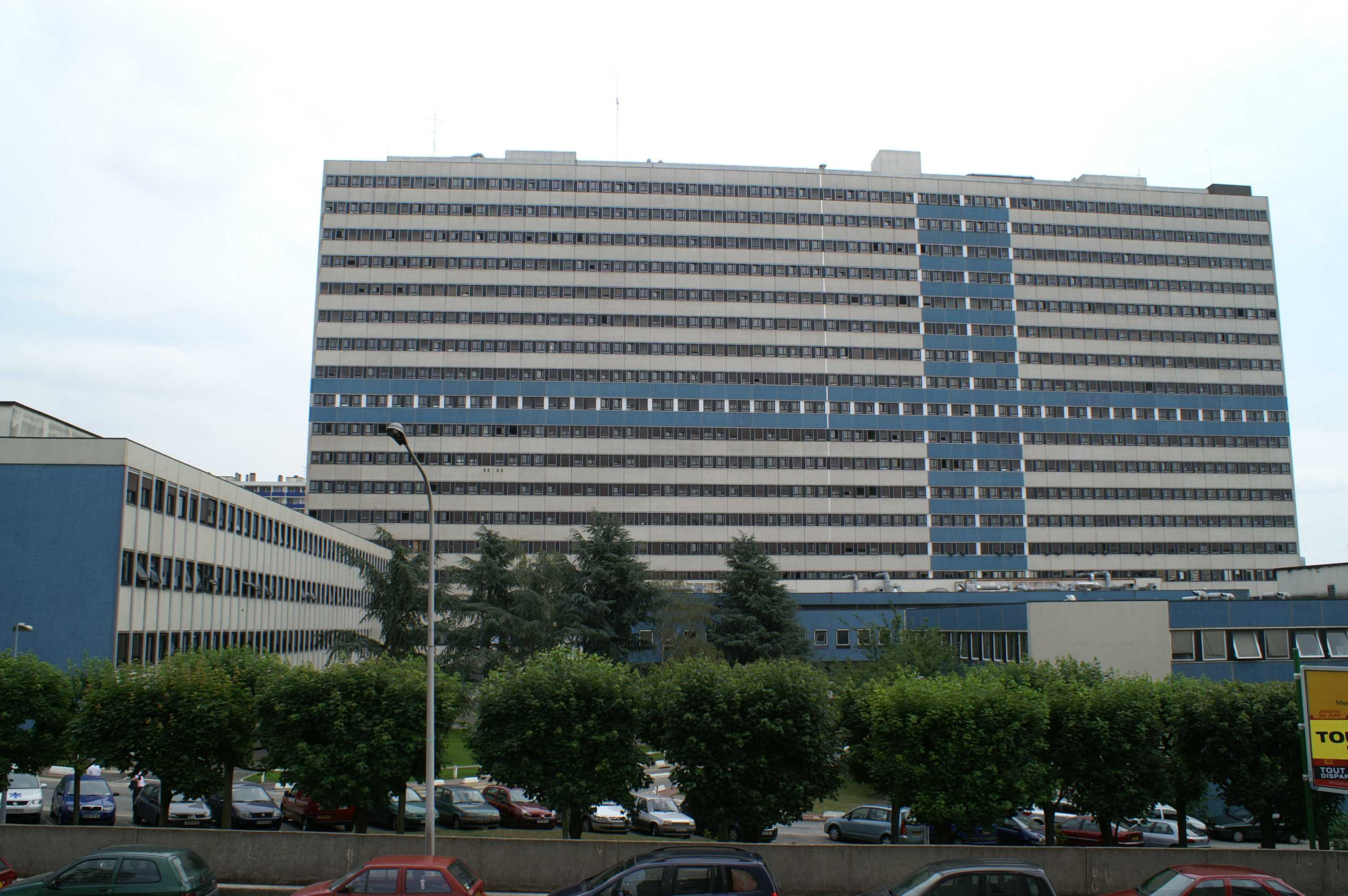 Creteil - Hopital Henri Mondor